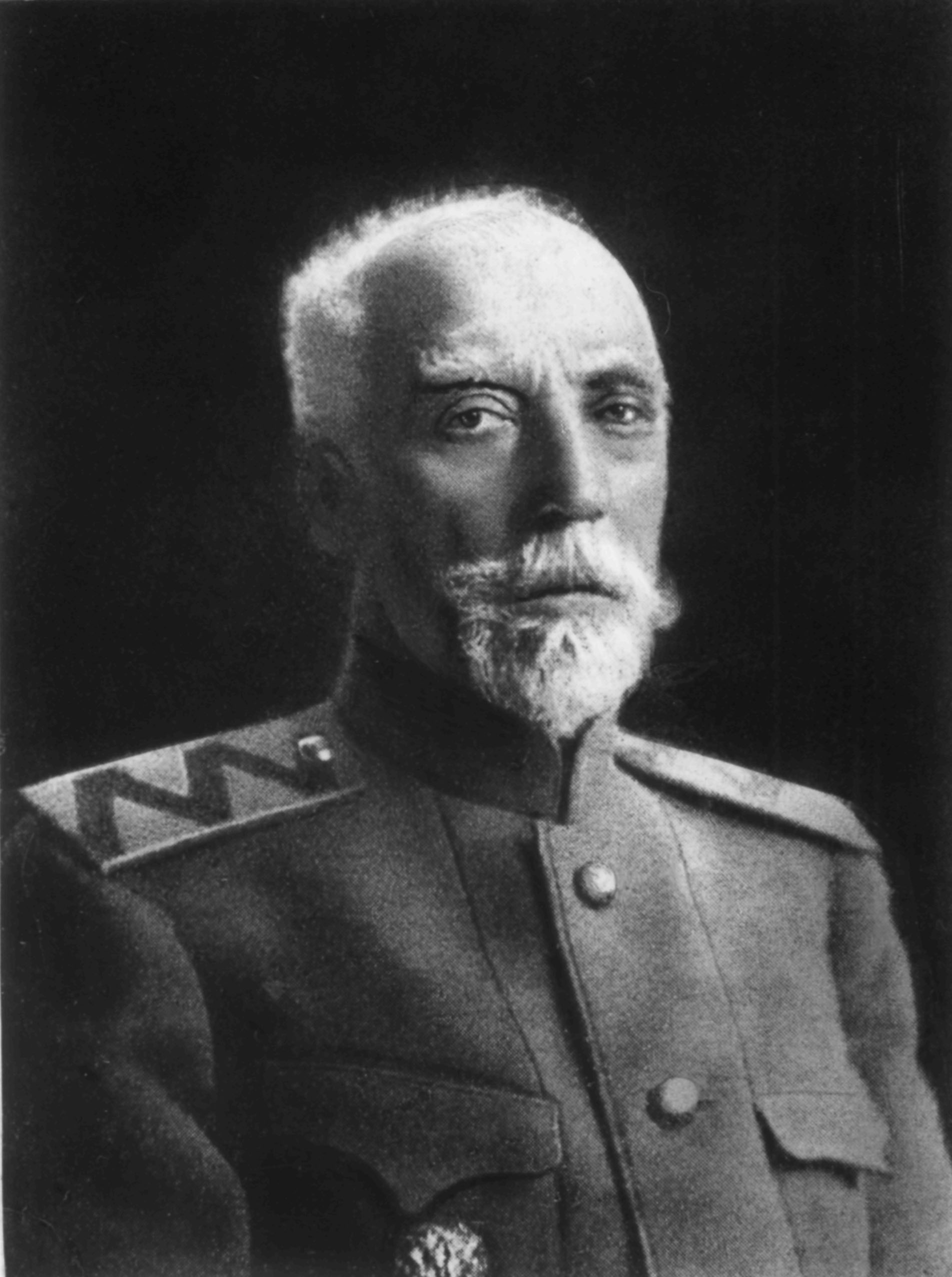 Портрет военного юриста, генерал-лейтенанта и псковского краеведа Н. Ф. Окулича-Казарина (1849-1923)